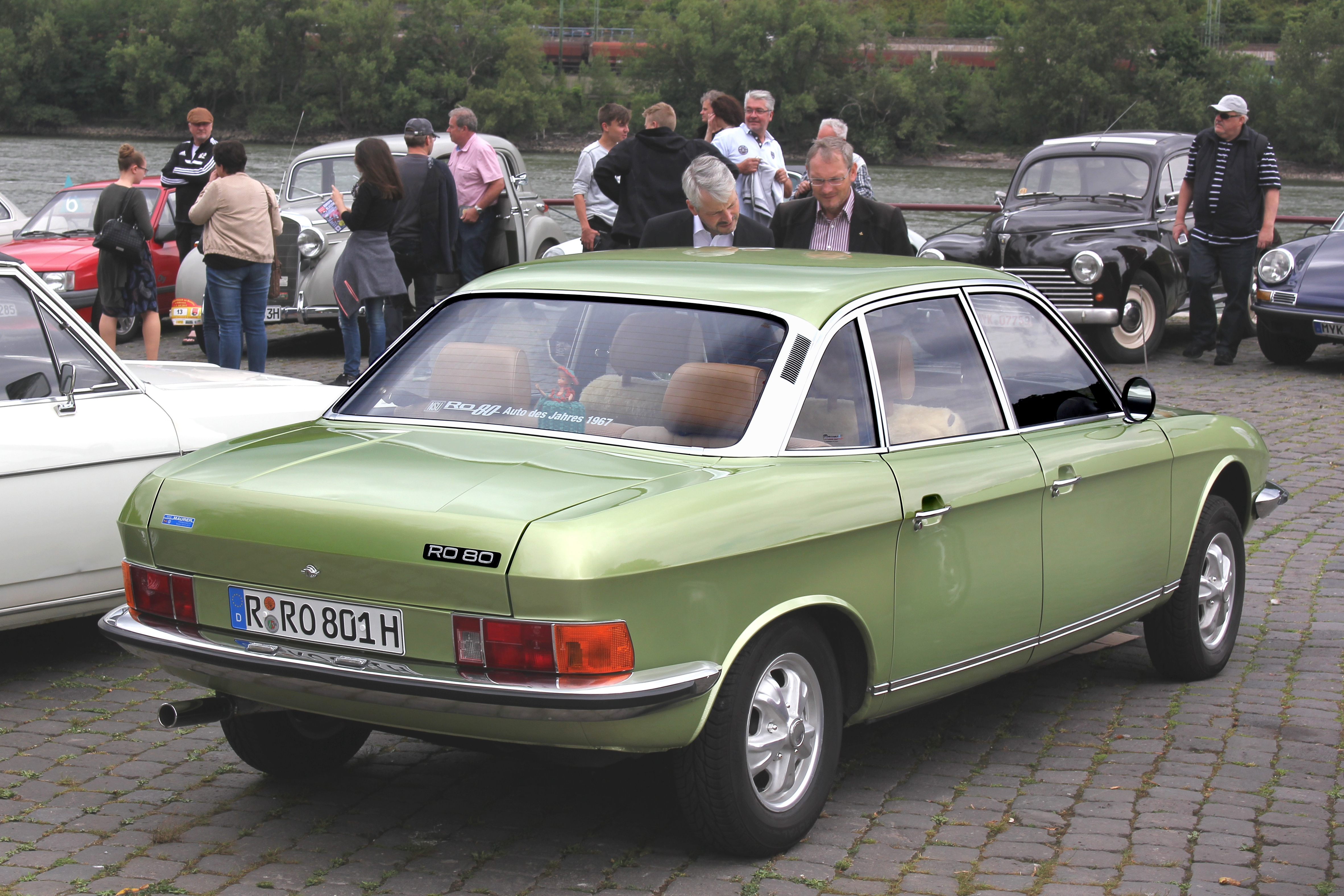 NSU Ro 80, Baujahr 1976, Wankelmotor (Kennzeichen verändert)